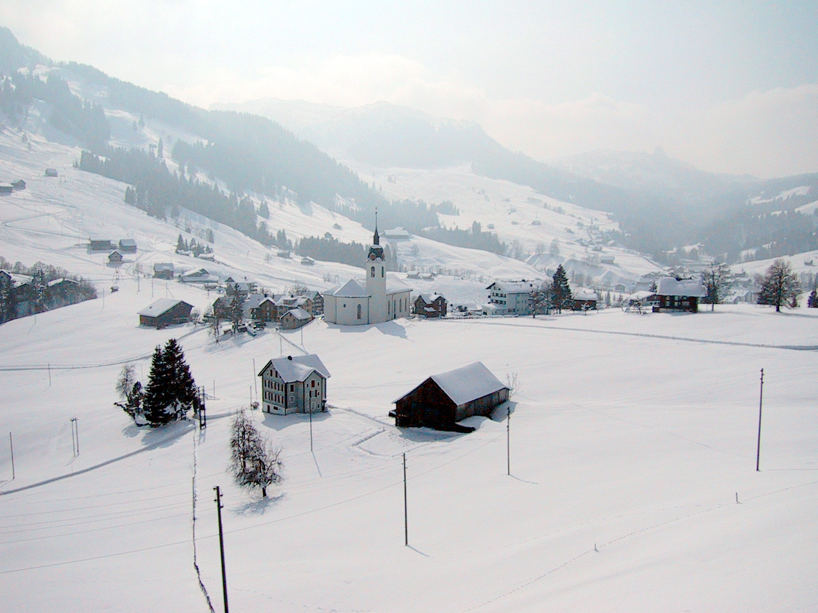 Aufnahme vom 26.Feb. 2005. Fotograf Peter Berger (selbst fotografiert). Lizenzstatus "GNU-FDL"